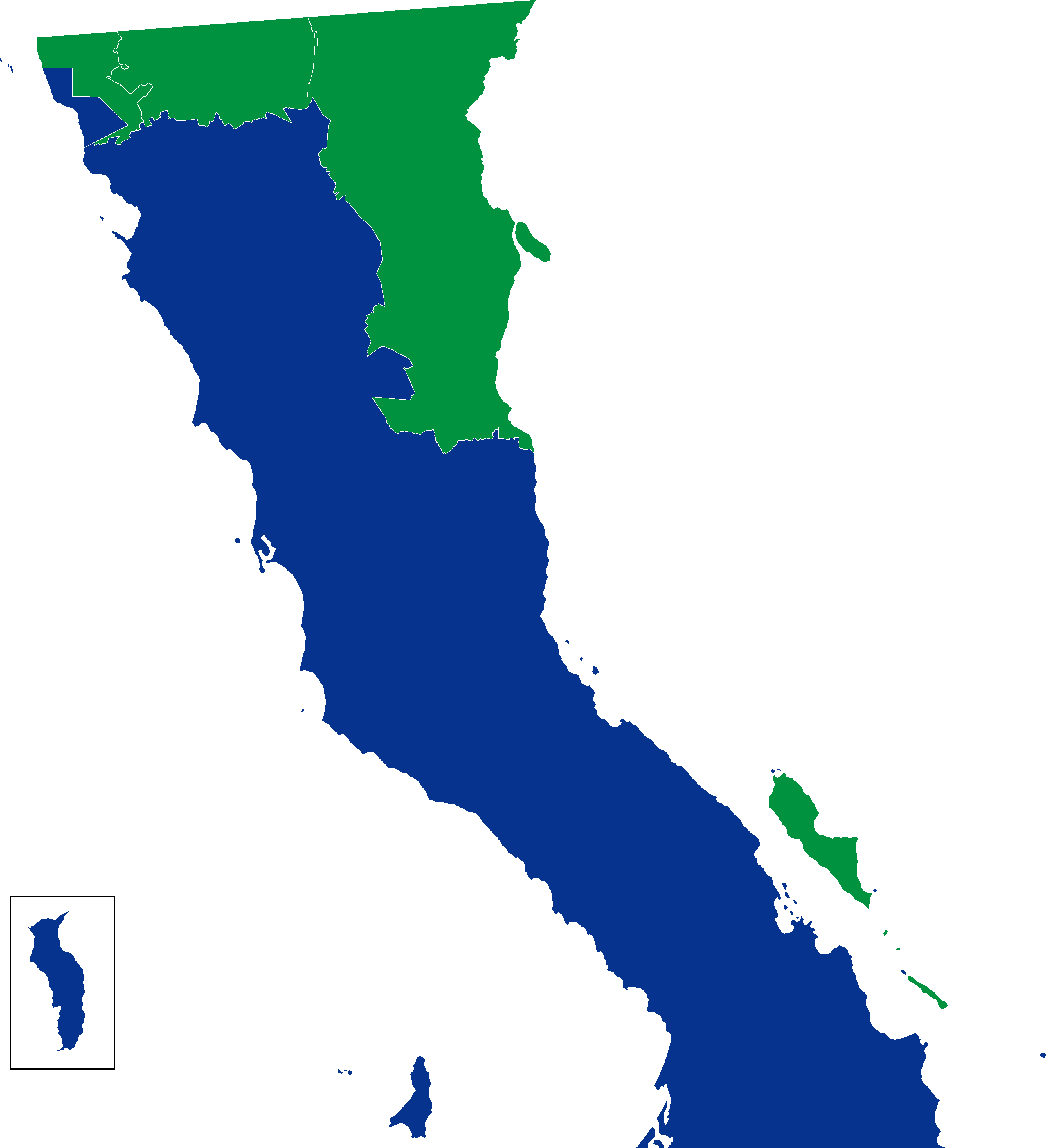 Resultados de la elección a Ayuntamientos por partido político en el estado de Baja California, México en 2004